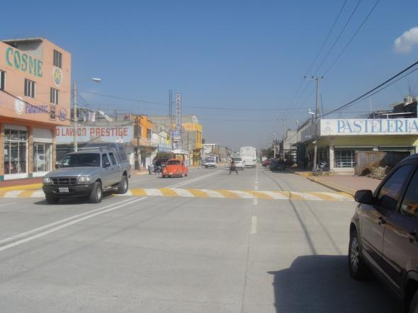 Calle de valle de chalco